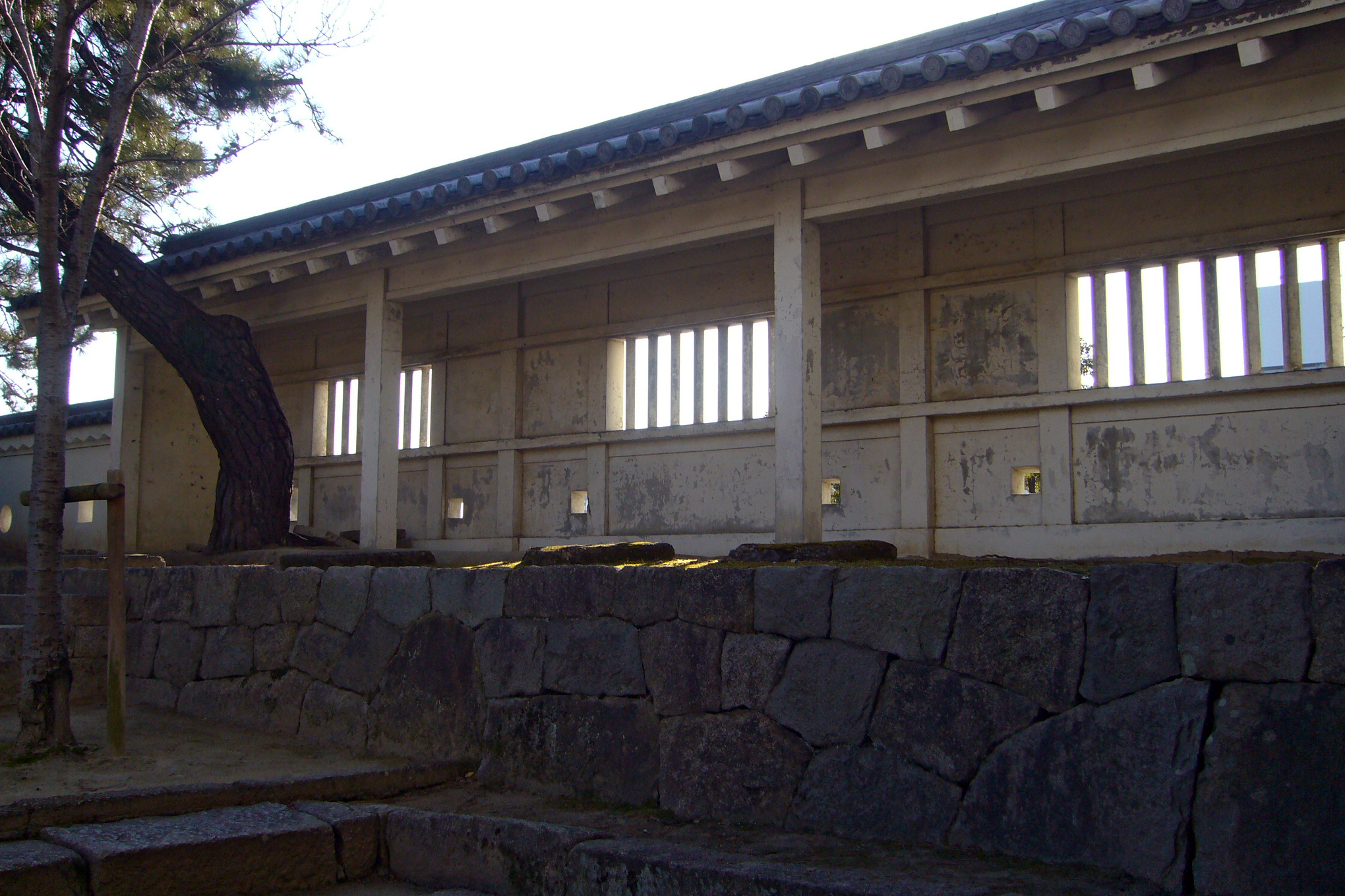 Fukuyama Castle "Tsukimi-yagura" in Fukuyama, Hiroshima prefecture, Japan